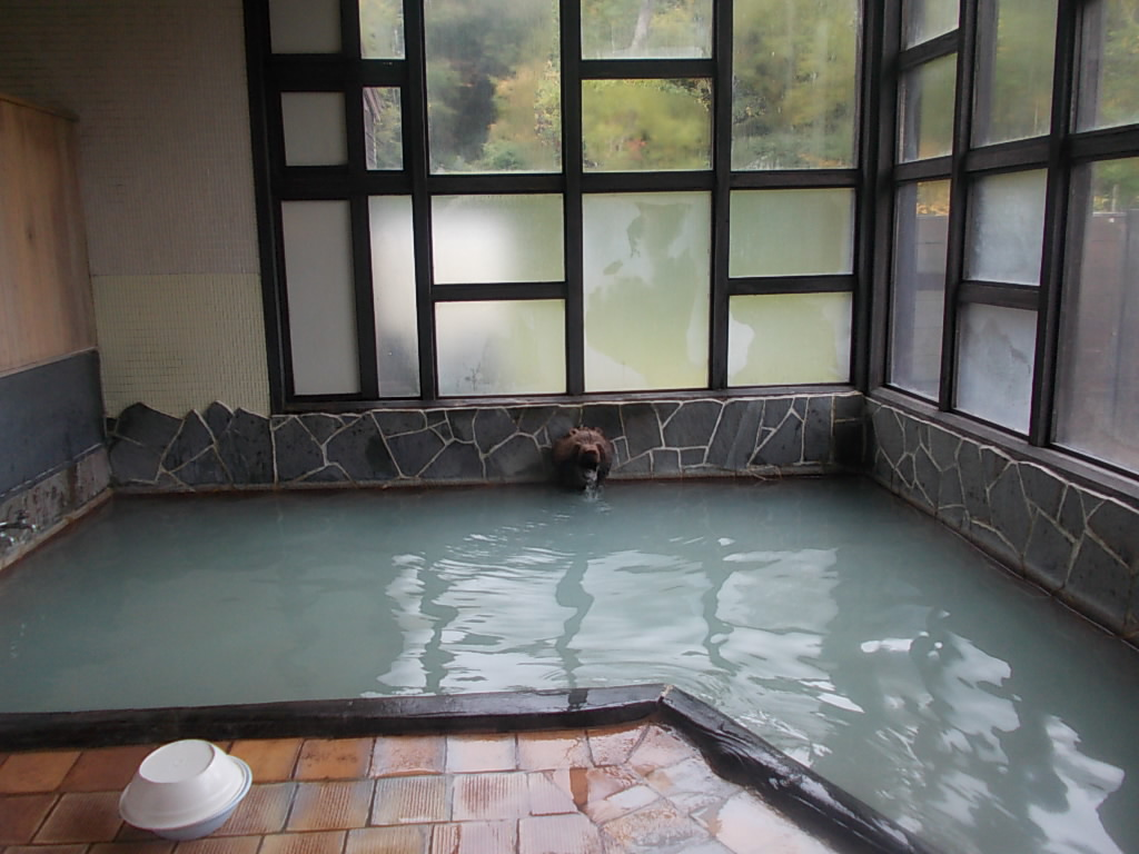 大雪山高原温泉（内湯）